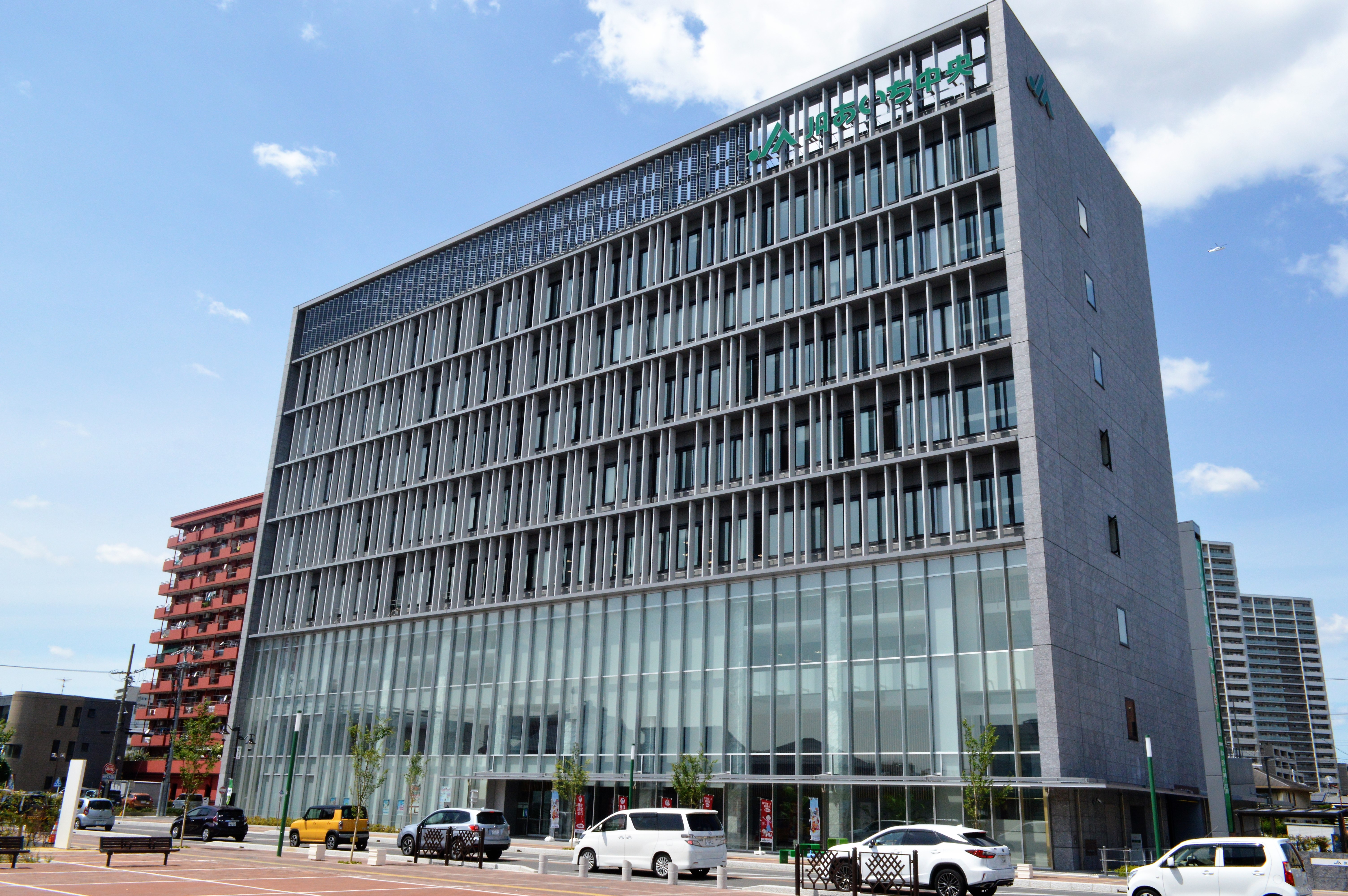 愛知県安城市にあるJAあいち中央本店。